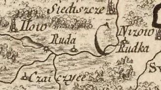 Ruda na mapie Carte de la Pologne divisée par provinces et palatinats et subdivisée par districts construite par J. A. B. Rizzi Zannoni, Paryż 1772